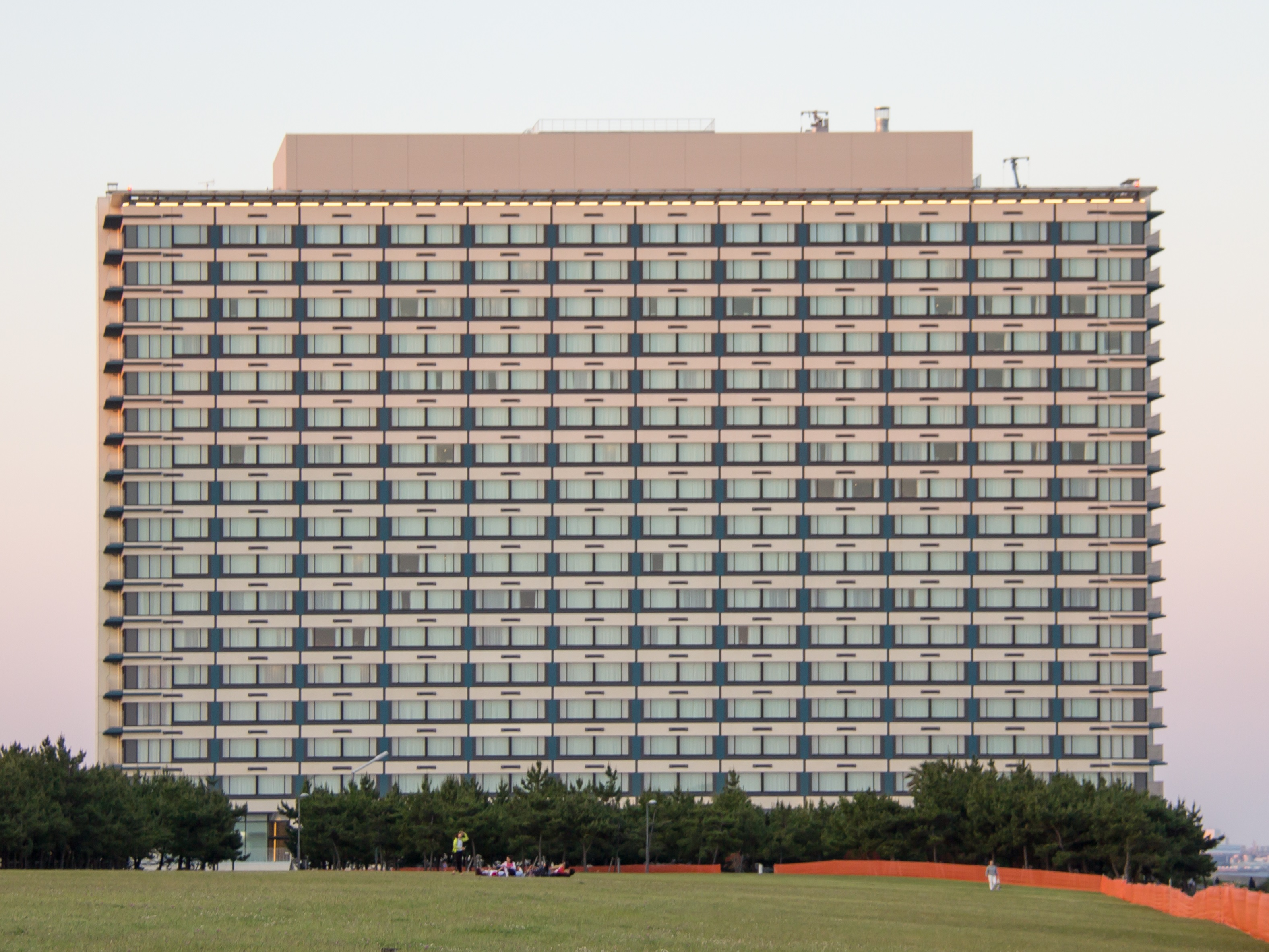 東京ベイ東急ホテル 浦安総合公園から撮影